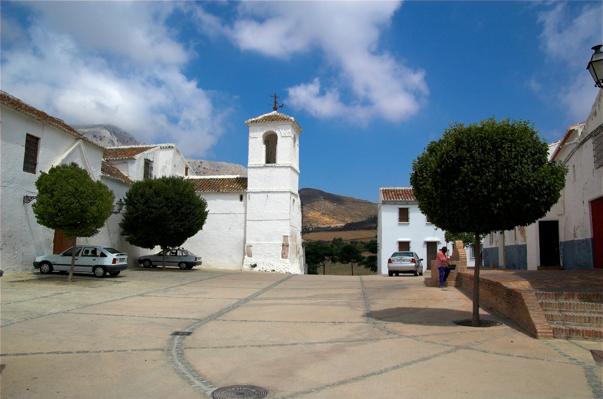 Panorámica de la plaza donde se contempla la iglesia del pueblo y a la izquierda se puede ver la fachada del Palacio de la Marquesa.